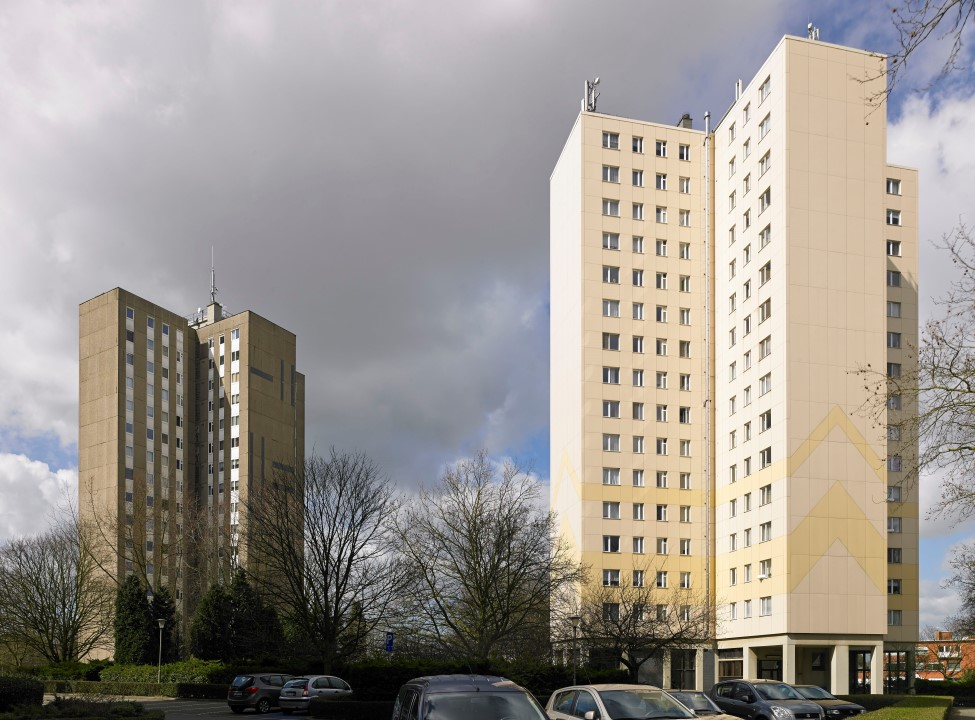 Antwerpen Moretusstraat 150, Paul Henri Spaaklaan 1